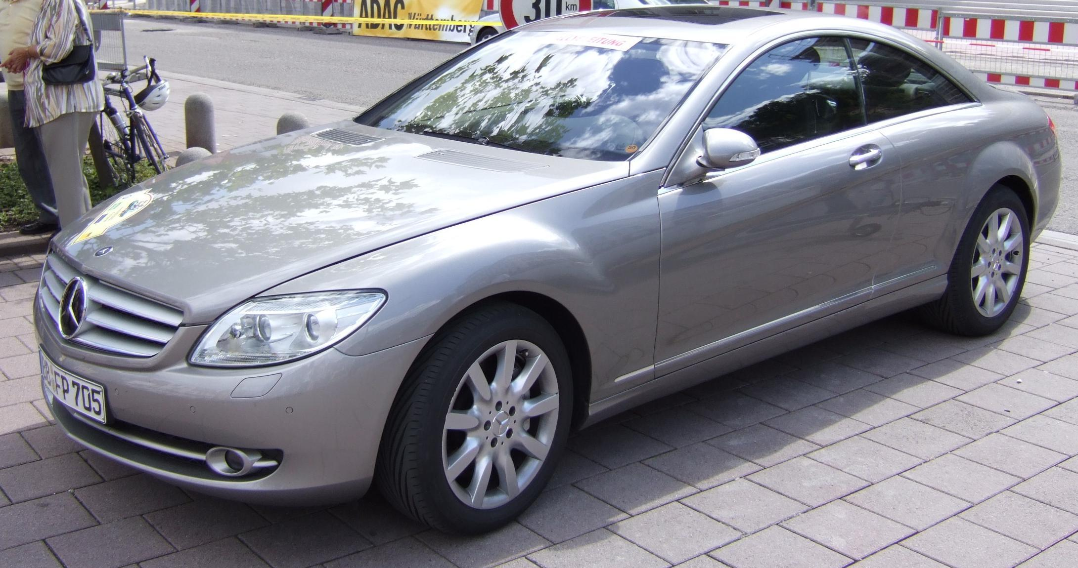 Mercedes Benz C216